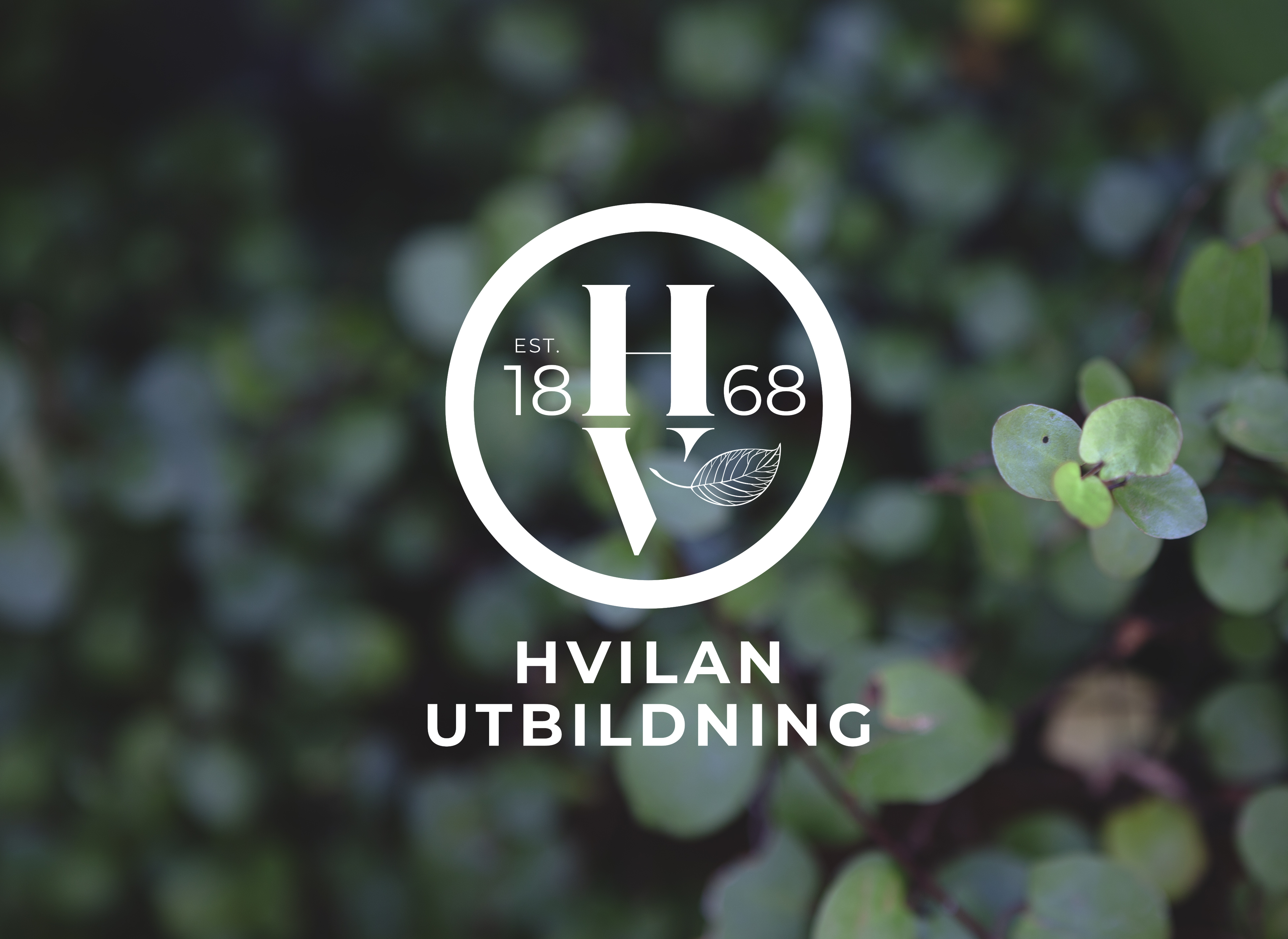 Hvilan Utbildning